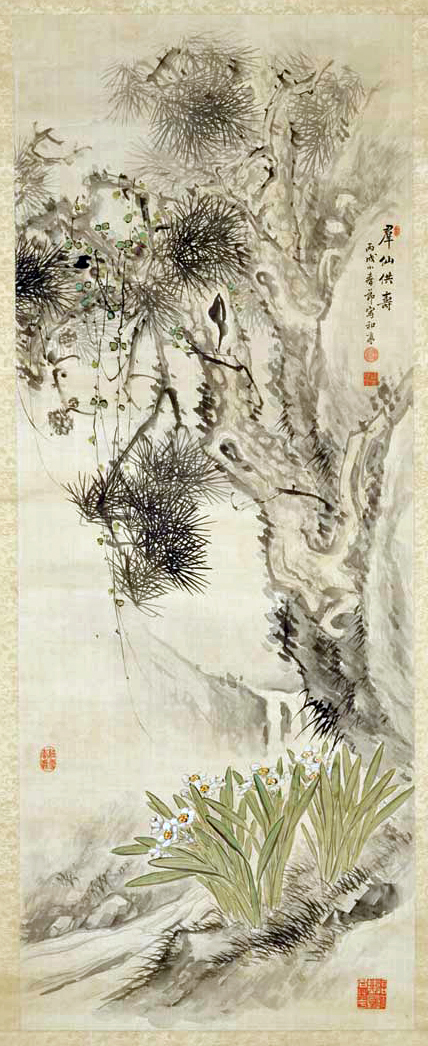 松に水仙 瀧和亭 明治19年